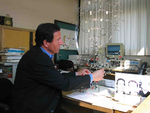 Dr. Ulf Pindur in seinem Büro